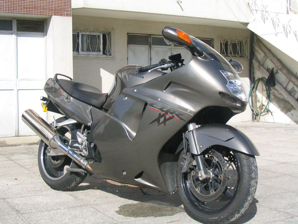 Honda CBR 1100XX SuperBlackbird